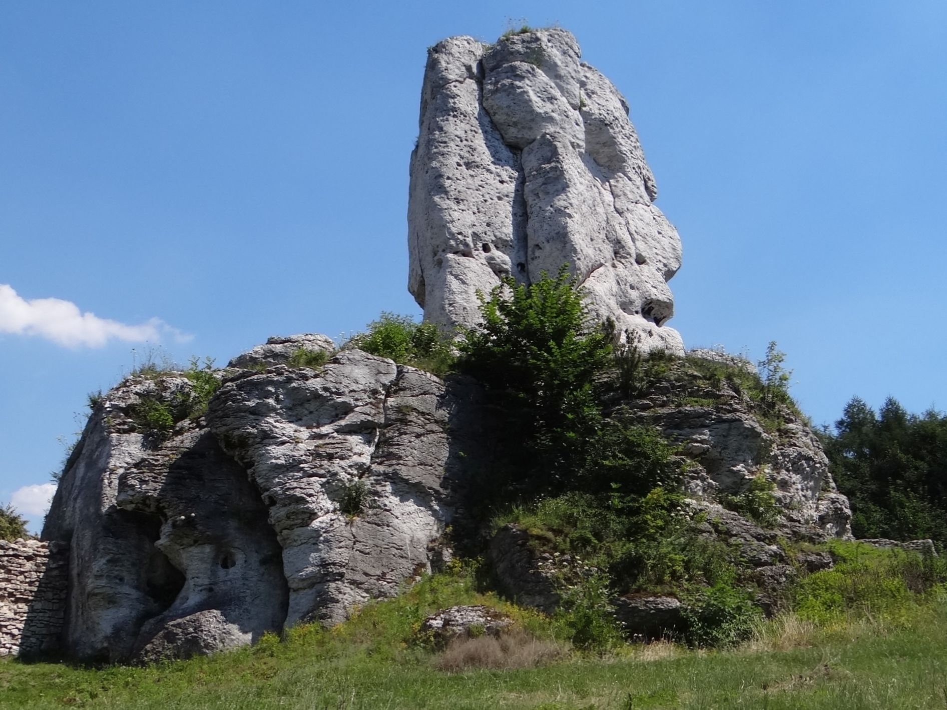 Skała Niedźwiedź na Zamku Ogrodzieniec w miejscowości Podzmcze